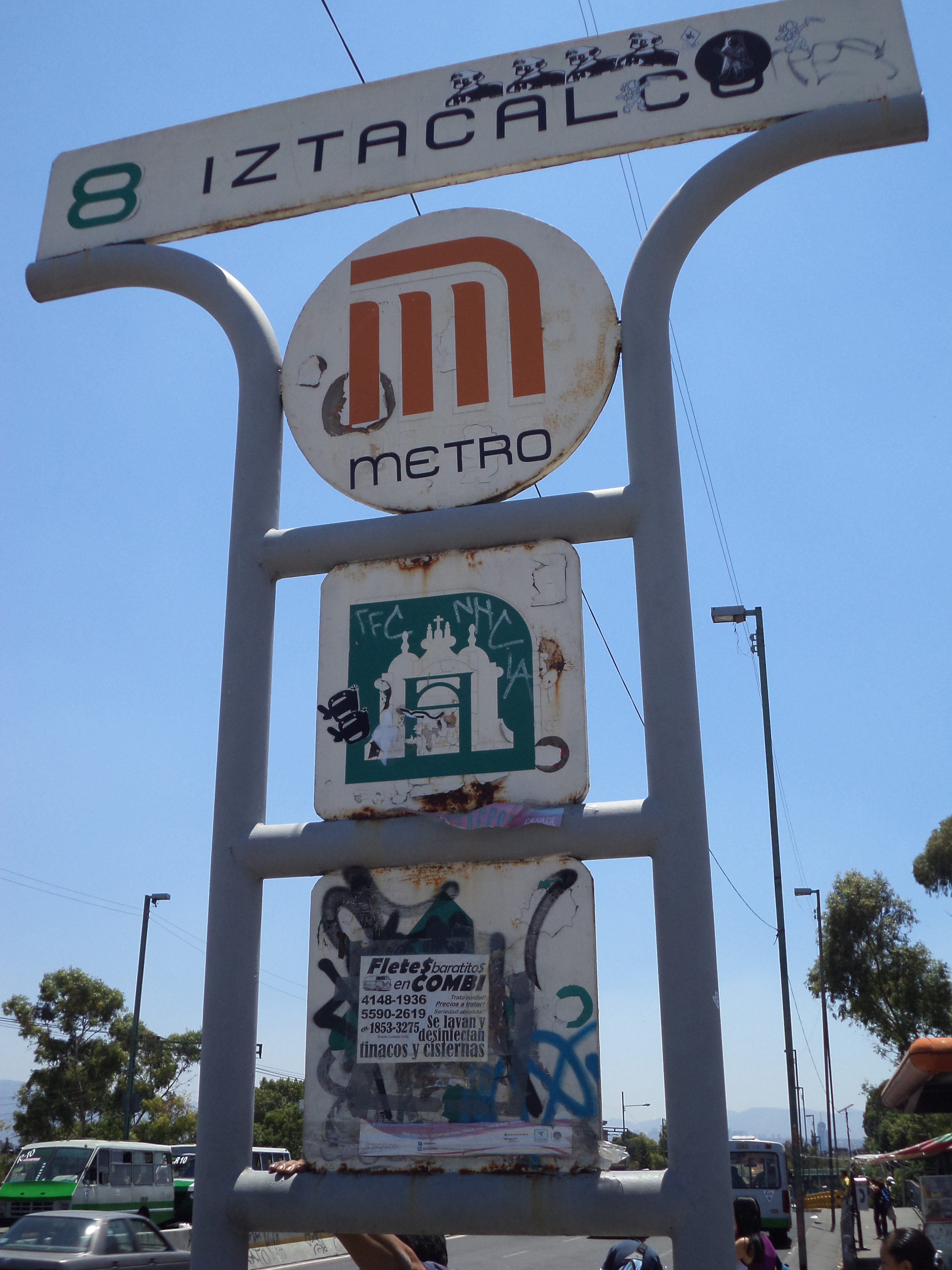 Estela estación Iztacalco